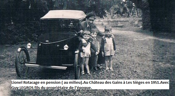 Lionel Rotcage au milieu , pensionnaire au Château des Gains à Les Siège. Avec Guy LEGROS fils du propriétaire de l'époque.1951